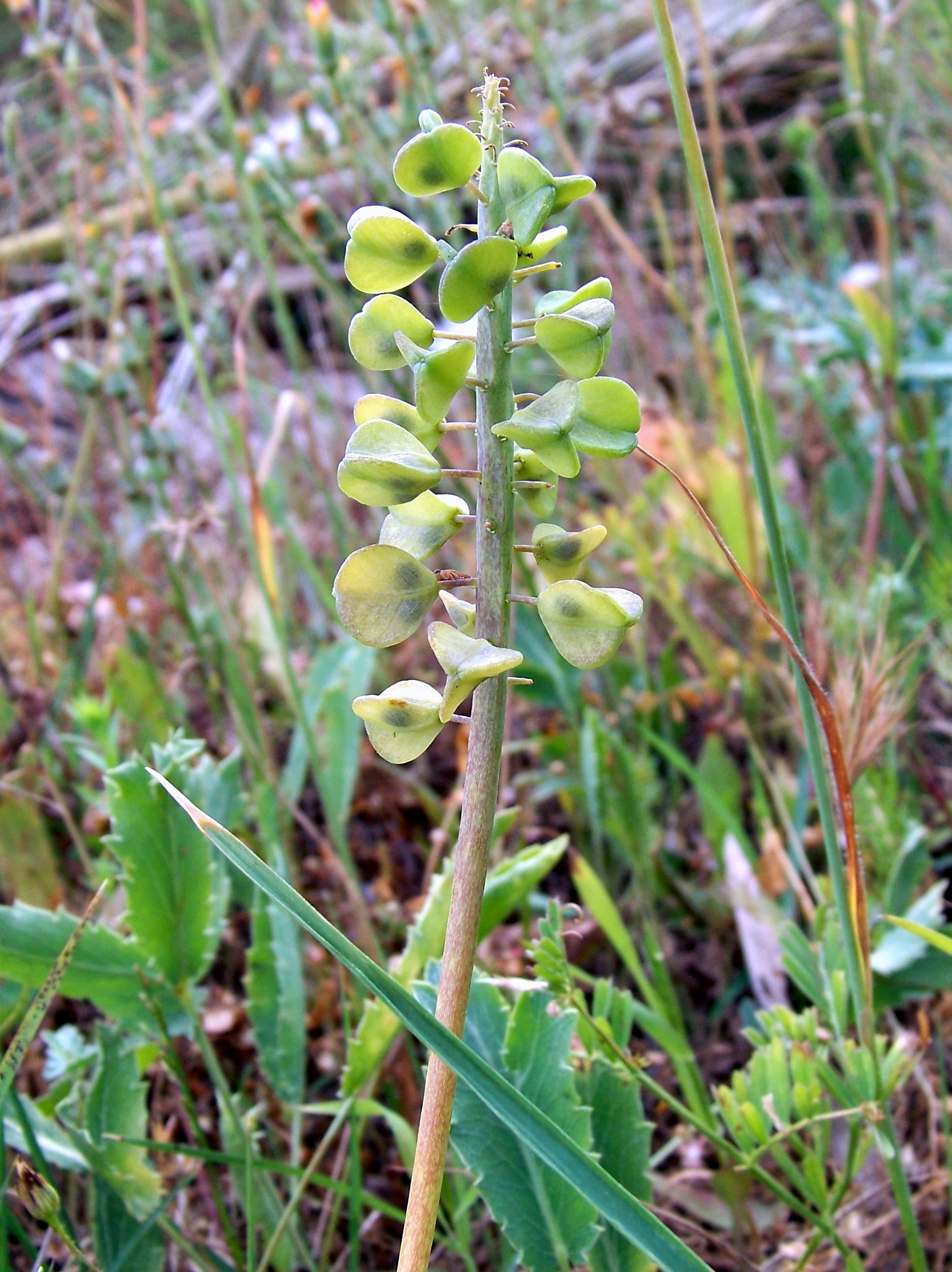 Muscari neglectum (nazarenos, penitentes, matacandiles, ...) - Frutos inmaduros in situ. - Cabezo de losOjales/de las Fuentes, Albatera, Provincia de Alicante 8España).